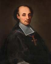 Mgr Duplessis de Mornay, O.F.M. Cap. (1663-1741), Coadjuteur, 1713, 3e évêque de Québec, 1727-1733